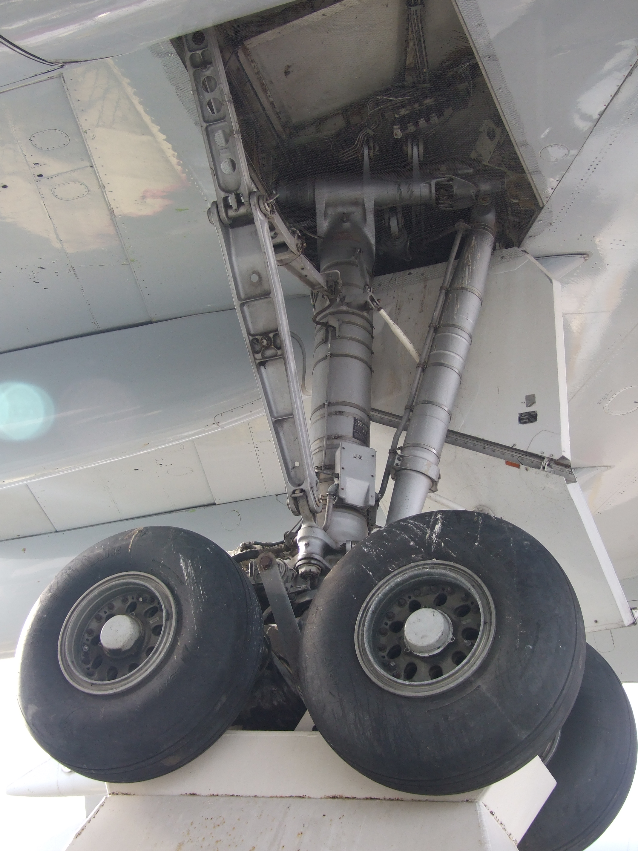 Boeing 747-230 Schleswig-Holstein in Technik Museum Speyer (Germany)